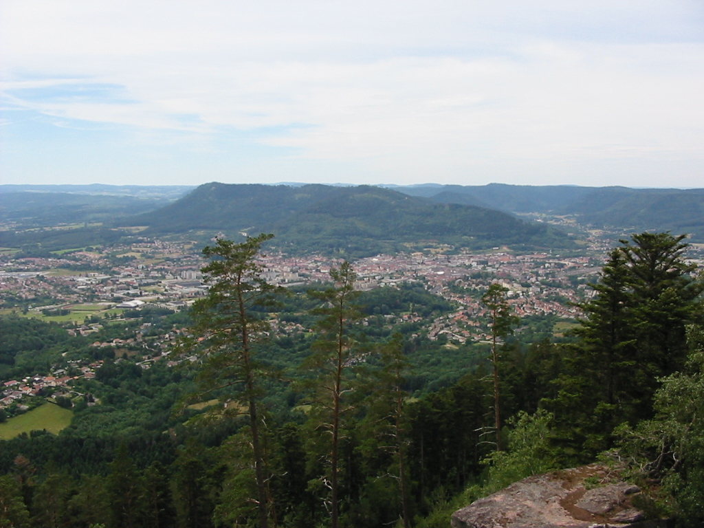 La ville de Saint-Dié-des-Vosges vue du massif de l'Ormont